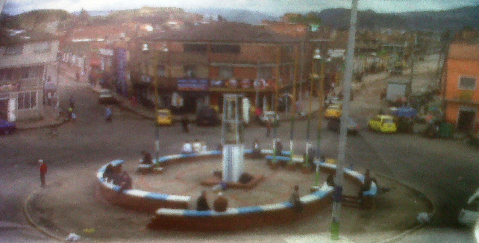 Monumento Representativo del barrio